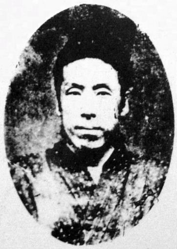 a Japanese man 桐野利秋 (Toshiaki Kirino)